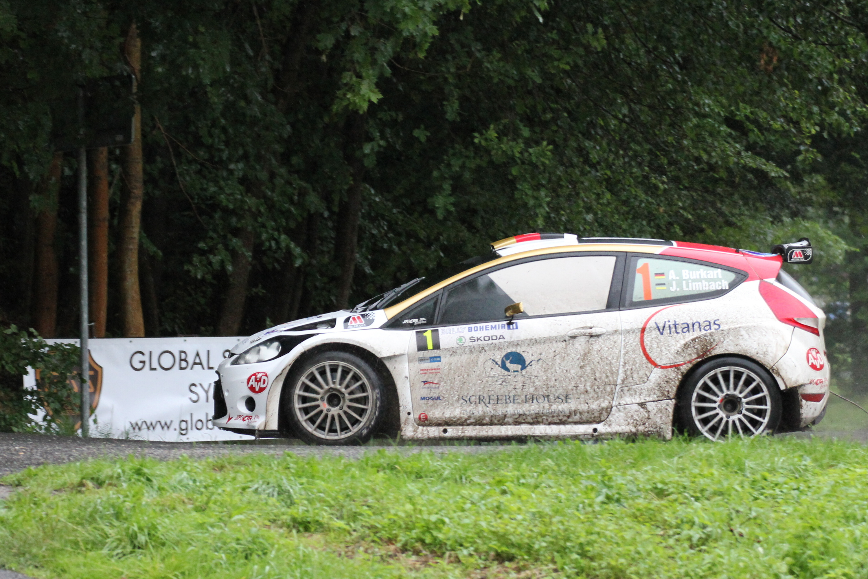 Rally Bohemia 2011 - Burkart, Aaron / Limbach, Jörn